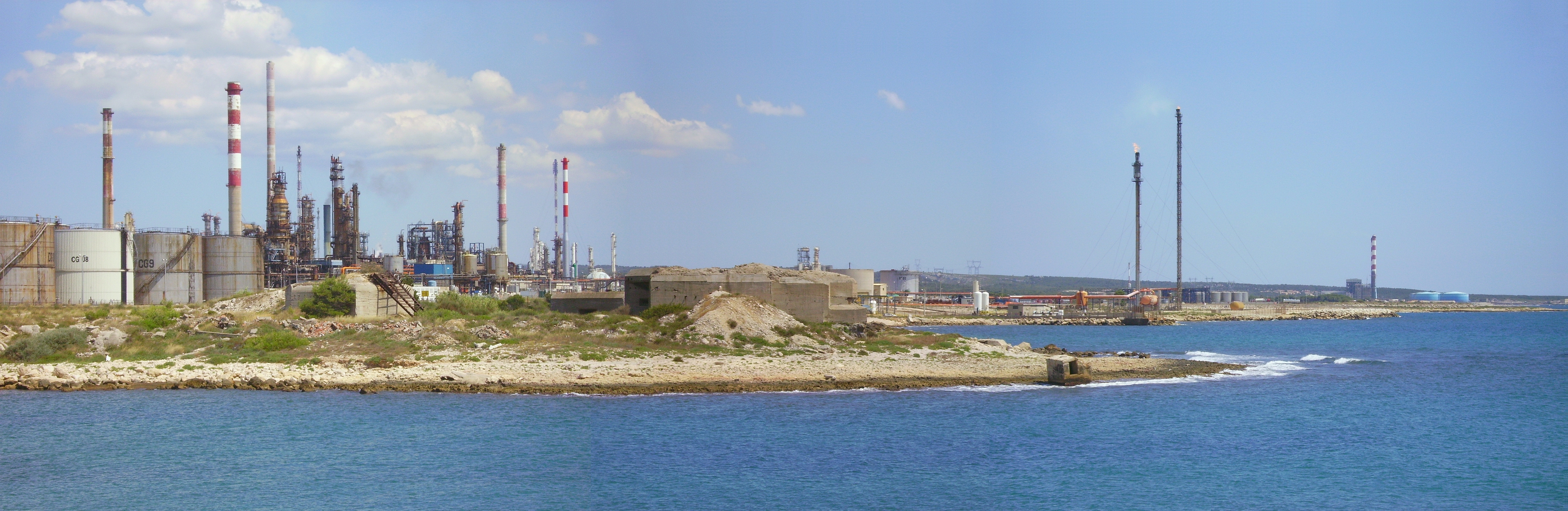 Vue panoramique du complexe pétrochimique de Martigues-Lavéra (France, Bouches-du-Rhône), face à la Méditerranée.